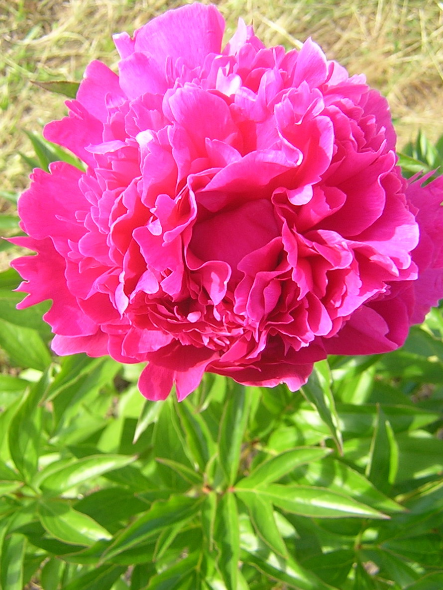 Paeonia 'Linne'